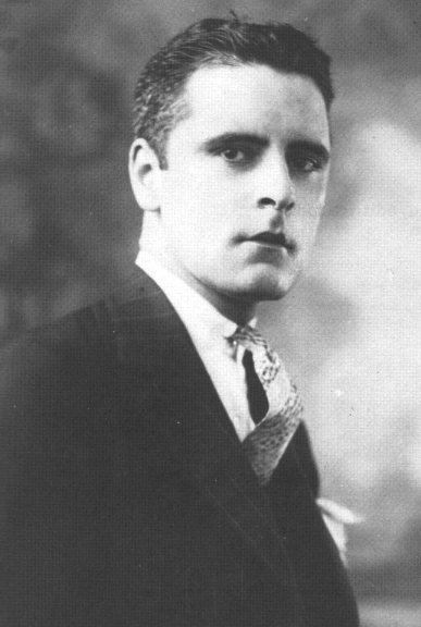 Jean C. Lallemand (1898-1987, à Montréal, Qc, Canada)